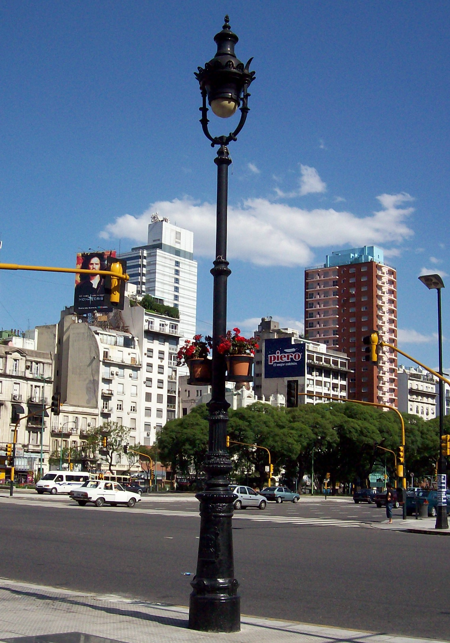 Avenida de Mayo y avenida 9 de Julio, Buenos Aires: Farol.